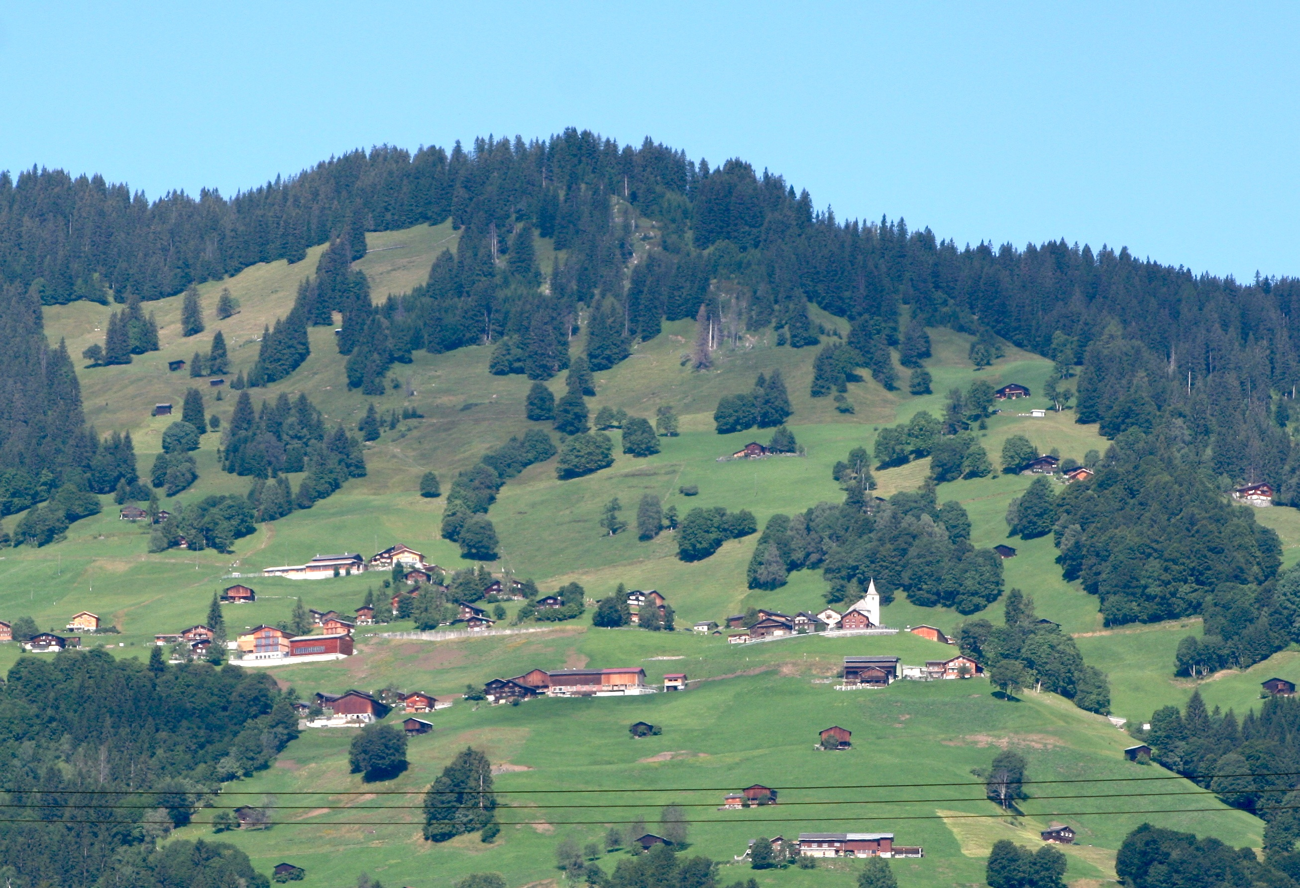 Furna im Prättigau